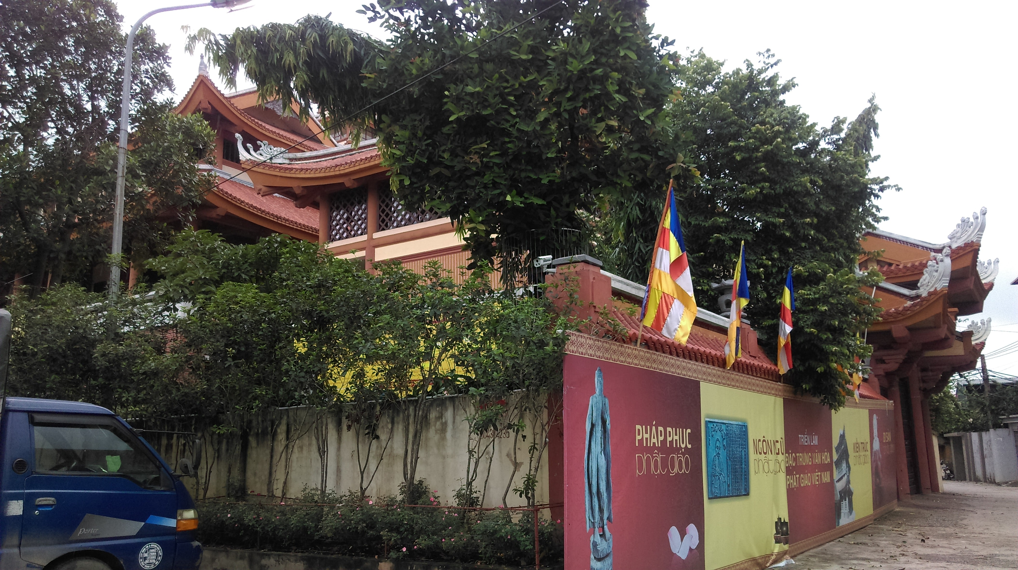 Chùa Yên Phú, Liên Ninh, Thanh Trì, Hà Nội